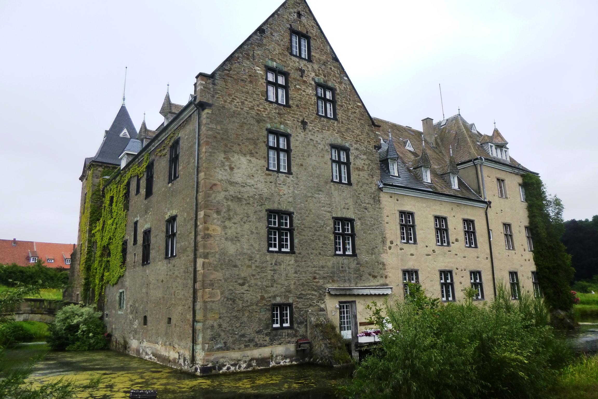 Schloss Höllinghofen